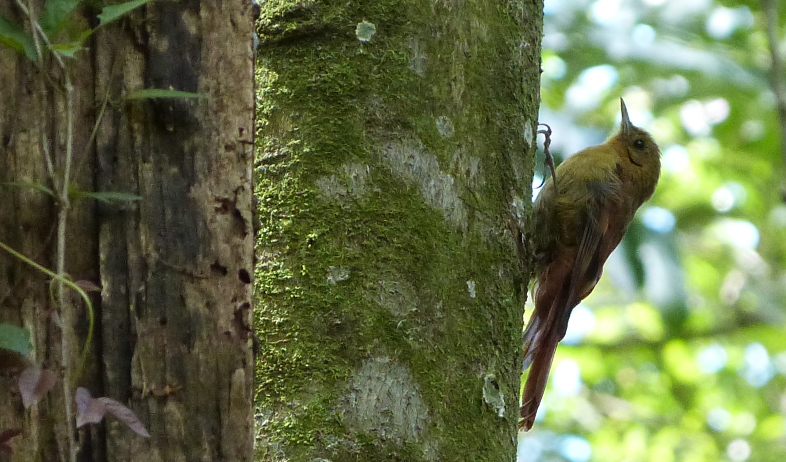 Foto tirada no Parque Estadual da Cantareira - SP